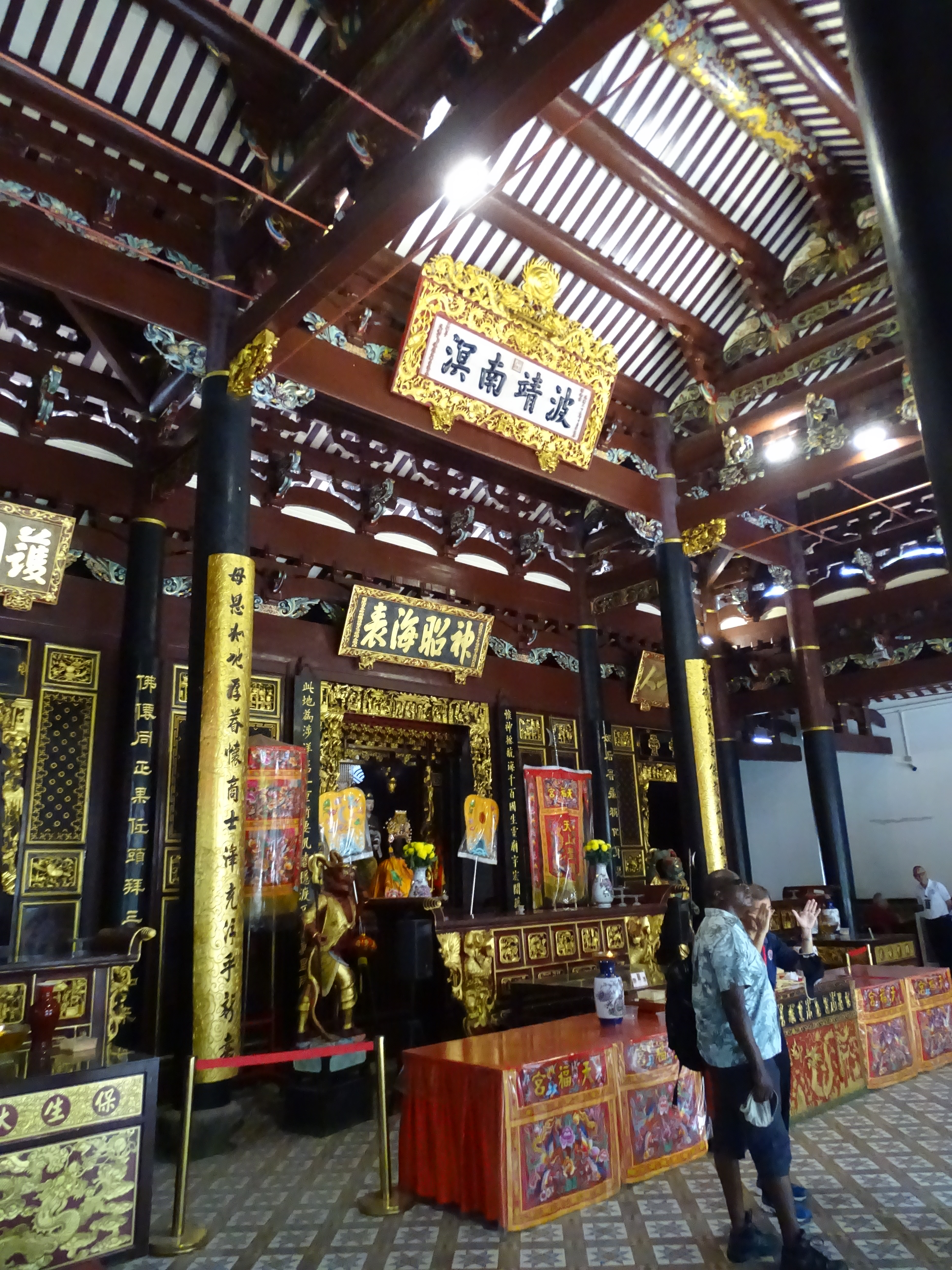 Mazu-Altar der Tempelanlage Thian Hock Keng, Chinatown Singapur